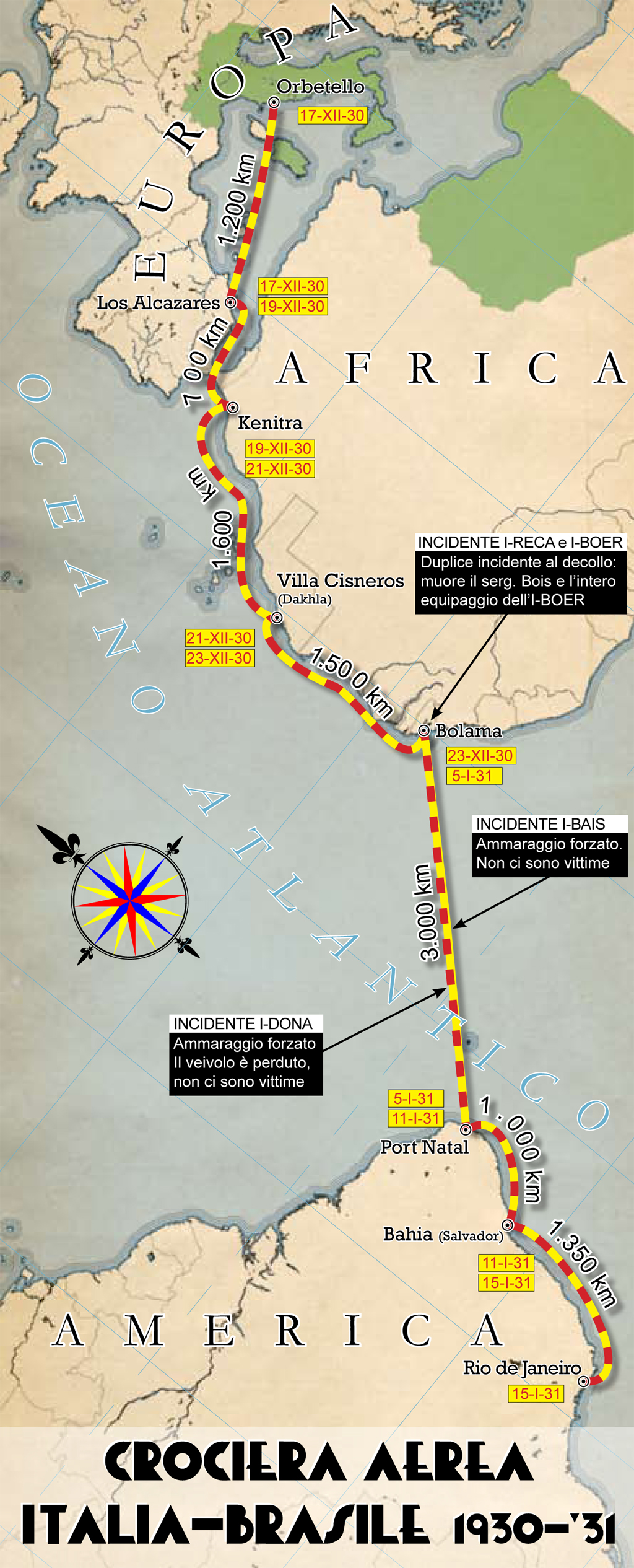 Crociera Aerea Italia - Brasile - 1930-31